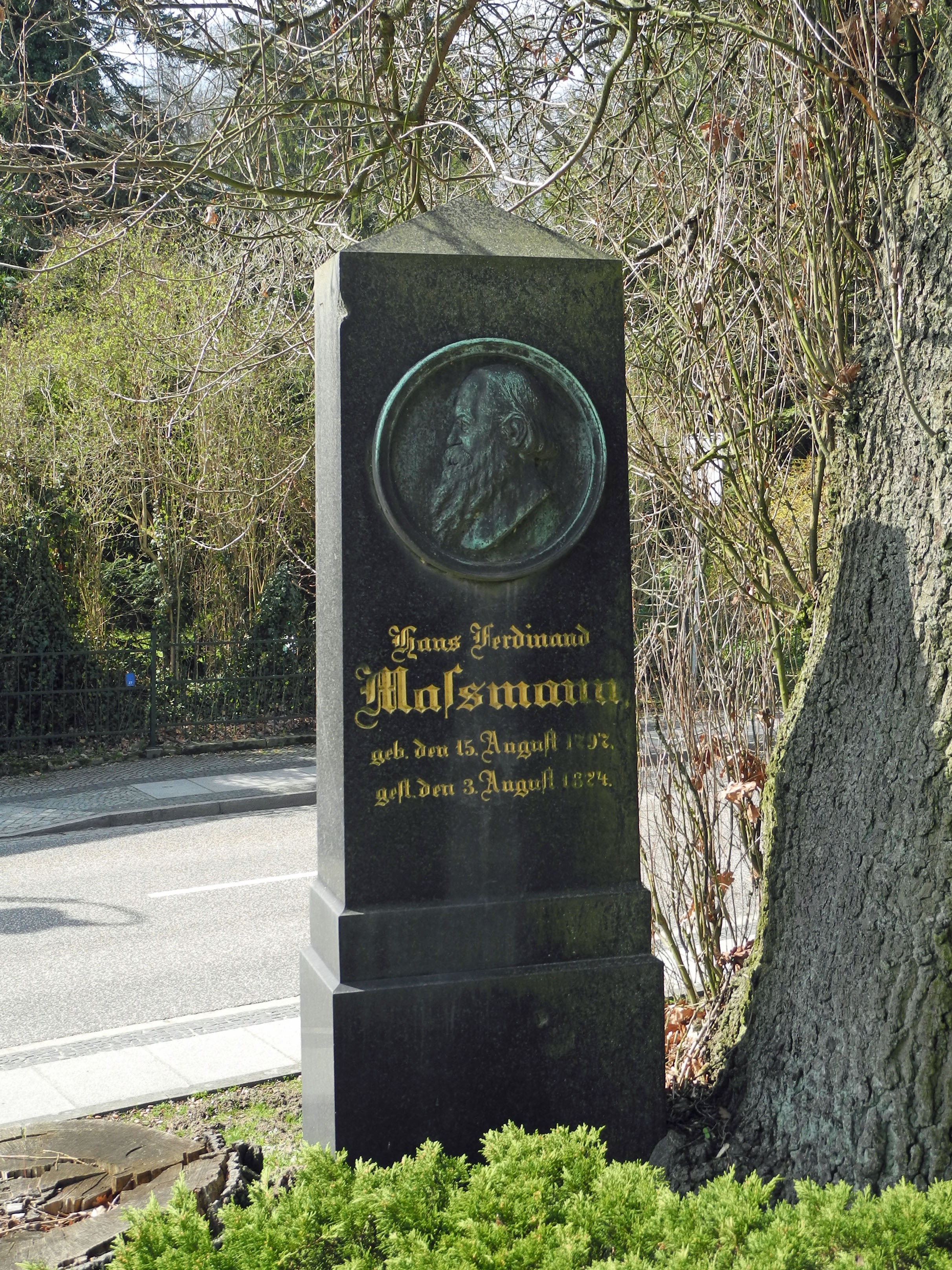 Grabmal des Philologen Hans Ferdinand Maßmann auf dem Kirchhof an der Jakobuskirche in Bad Muskau